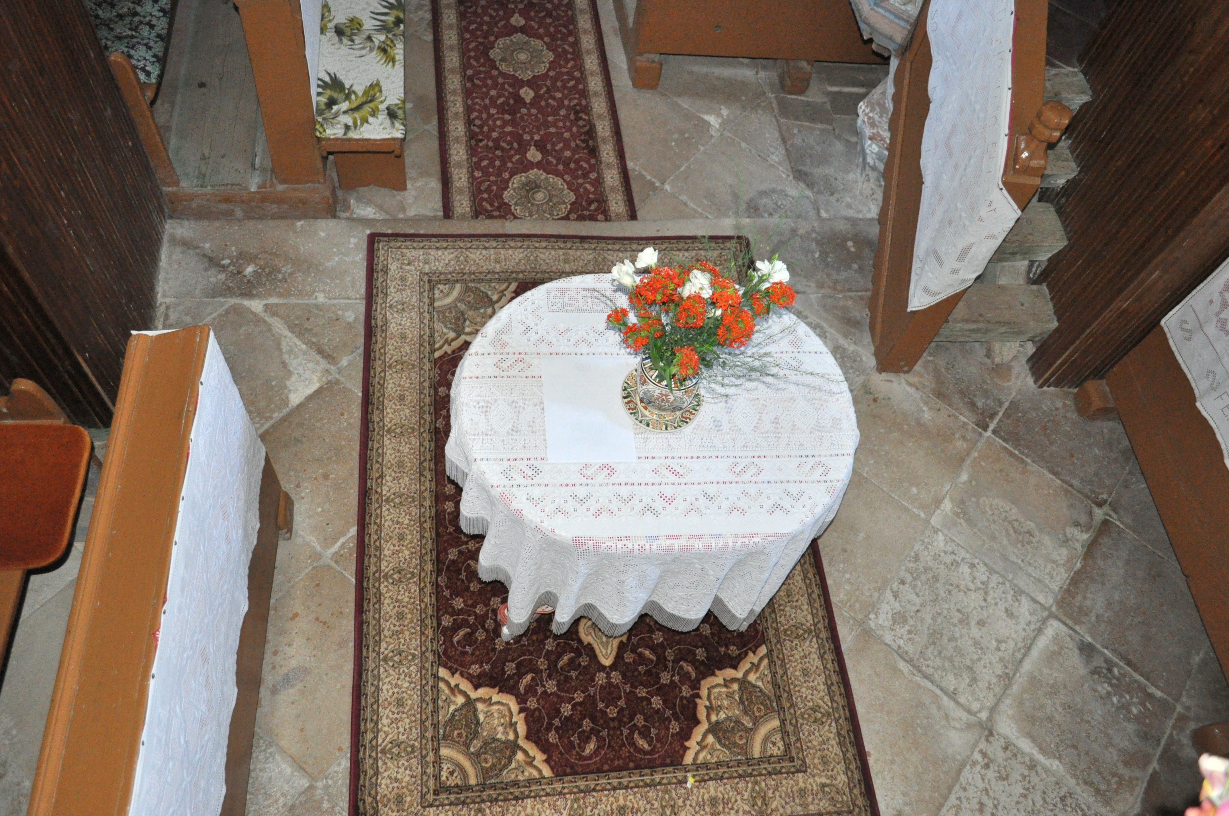 Biserica reformată, sat BĂGARA; comuna AGHIREŞU